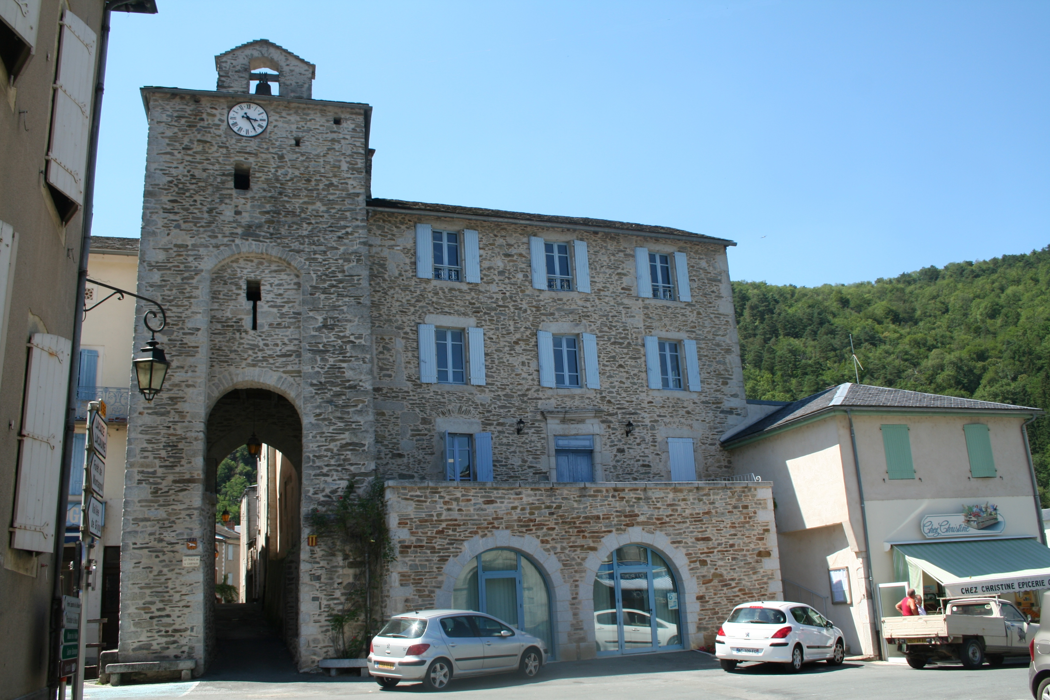 Vabre (Tarn) - porte fortifiée de la ville : Lo Trauc de la campana.